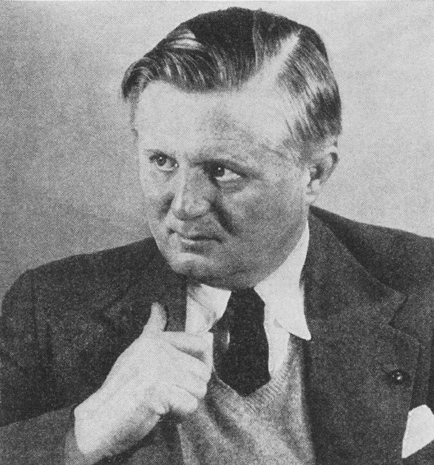 Fritz Busch vers 1930.